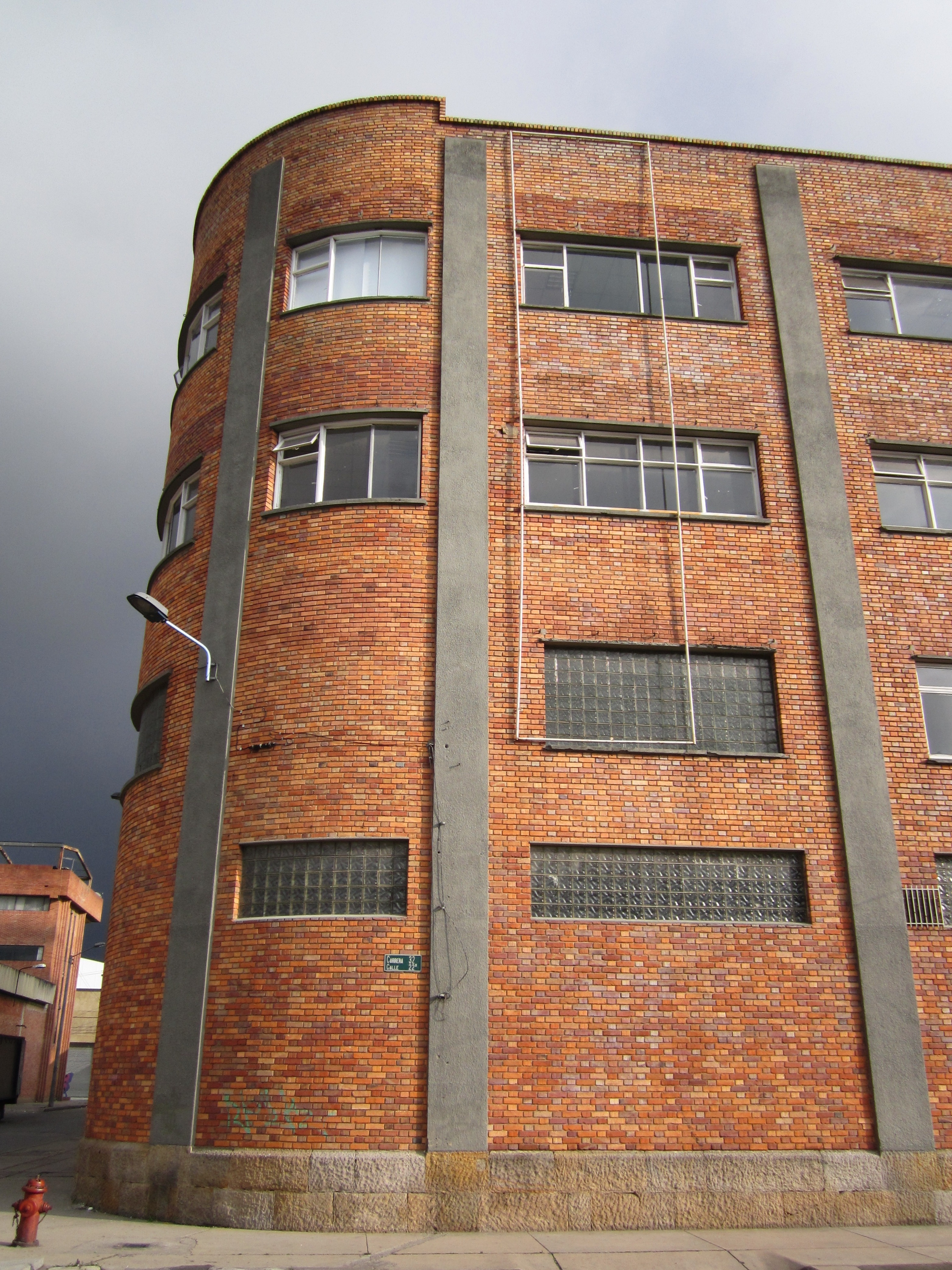 Fábrica de Cervezas Andina, esquina de la calle 32 con calle 22, en el barrio La Florida Central de la localidad de Puente Aranda.